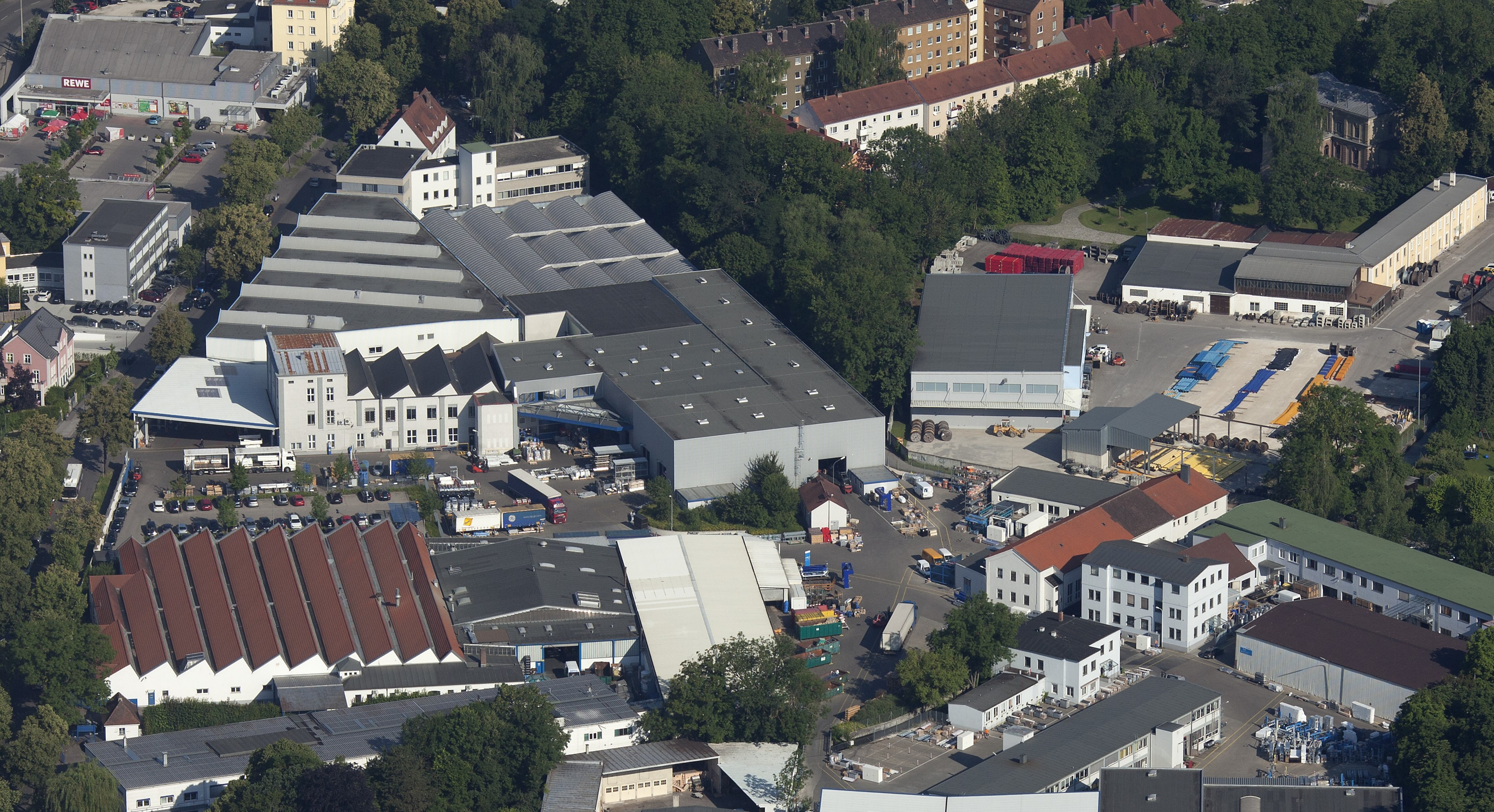 Augsburg am Standrand der Altstadt